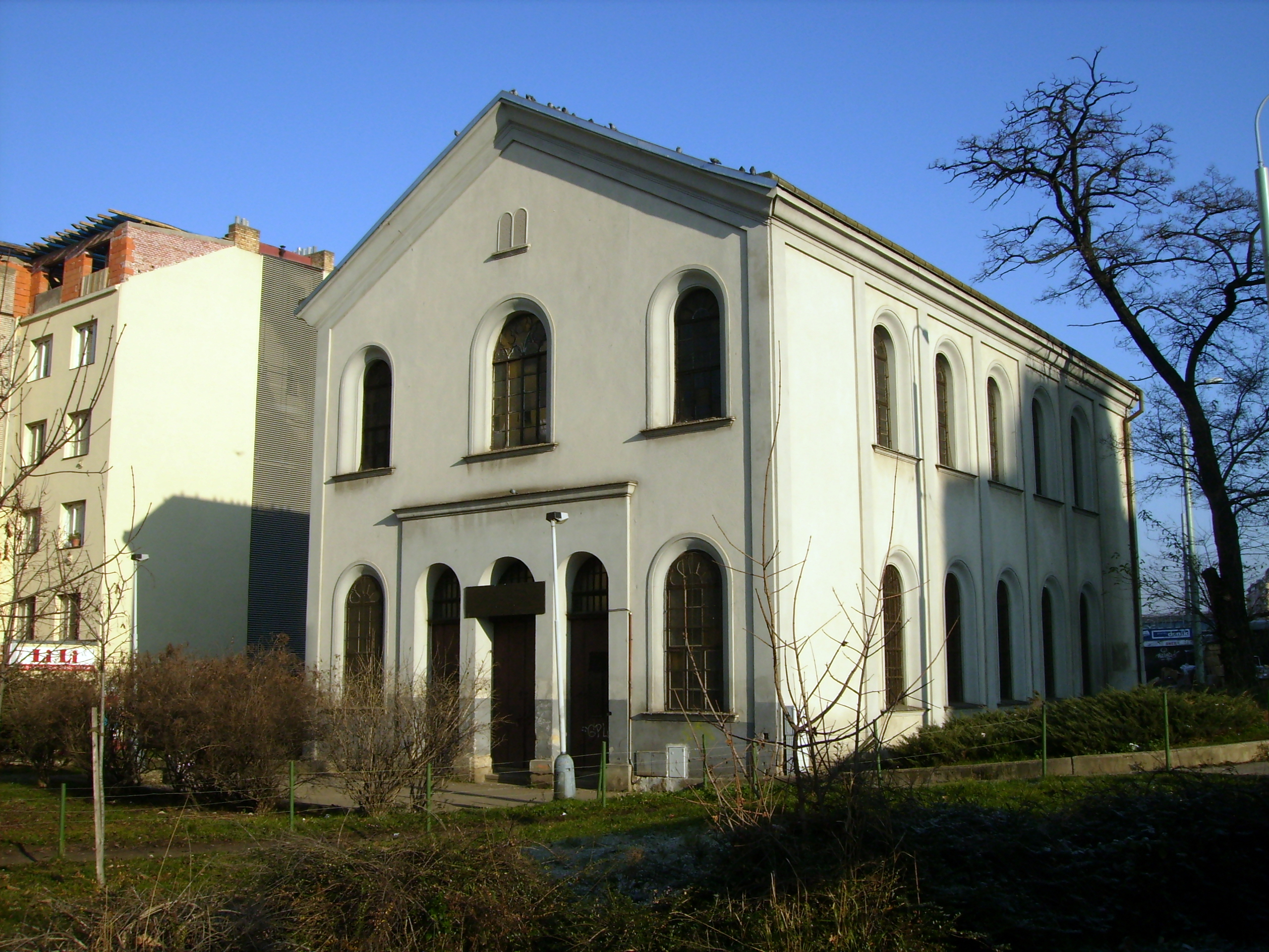 Libeňská synagoga, která stojí na pražské Palmovce. Stav z prosince 2006. Autor: Petr Vilgus